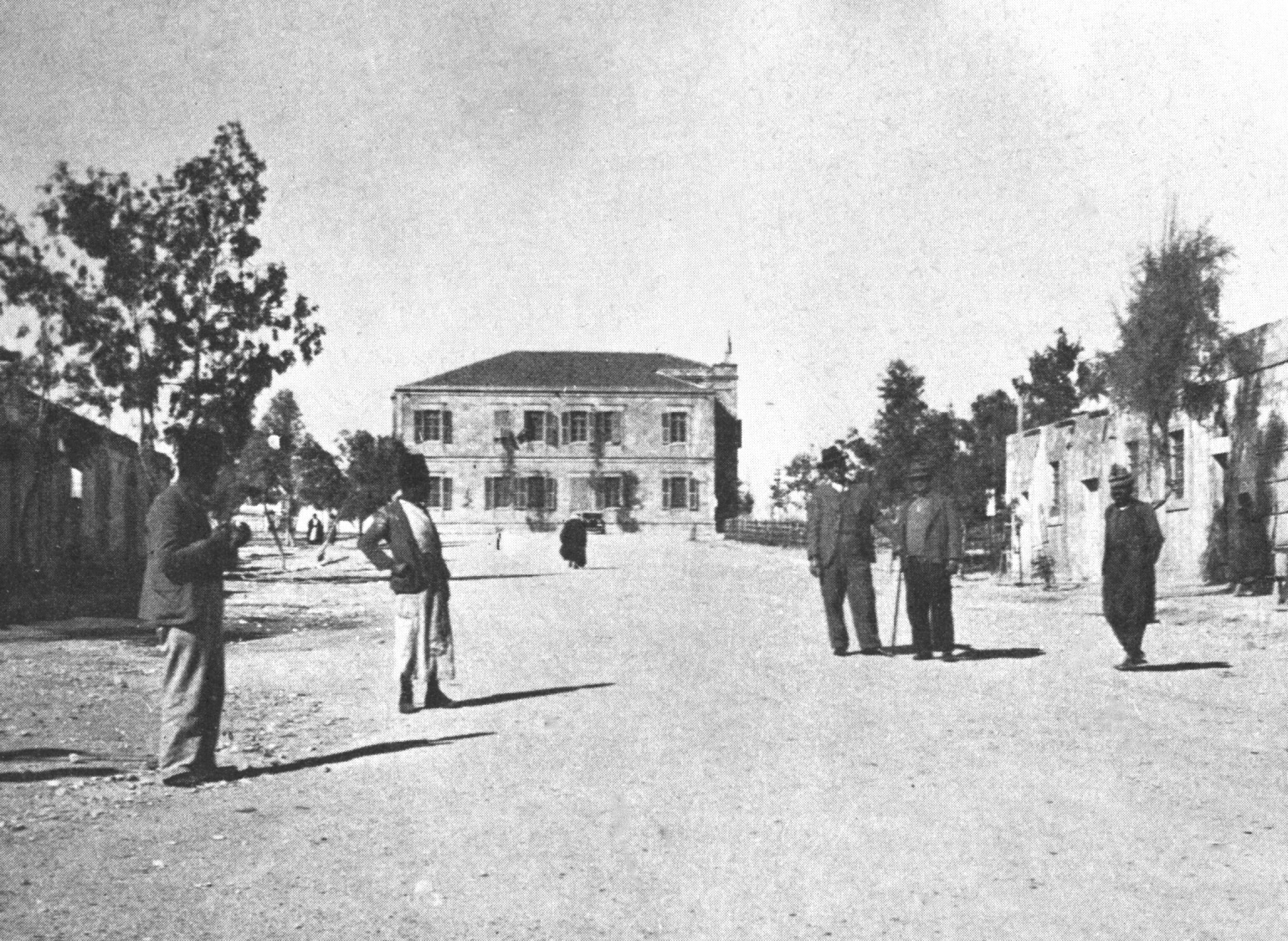 באר שבע בשנות השלושים: רחוב 20 המטר (כיום רחוב קק"ל) ובית הסארייה בלבוש אירופאי: עמינדב אלטשולר (ימין) וחירם דנין